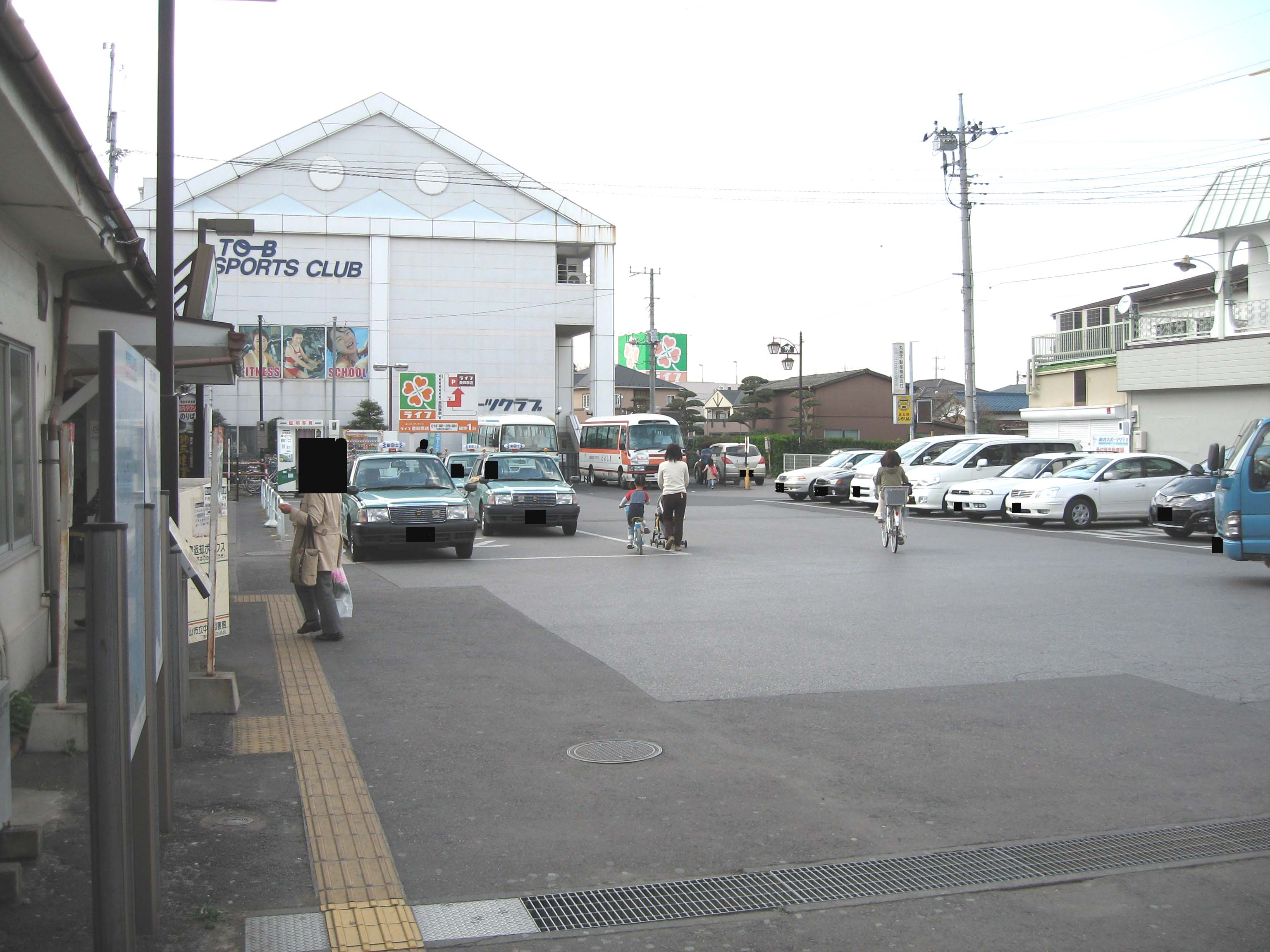 Toyoshiki station, Tobu-Noda Line, Chiba, Japan, 豊四季駅北口駅前